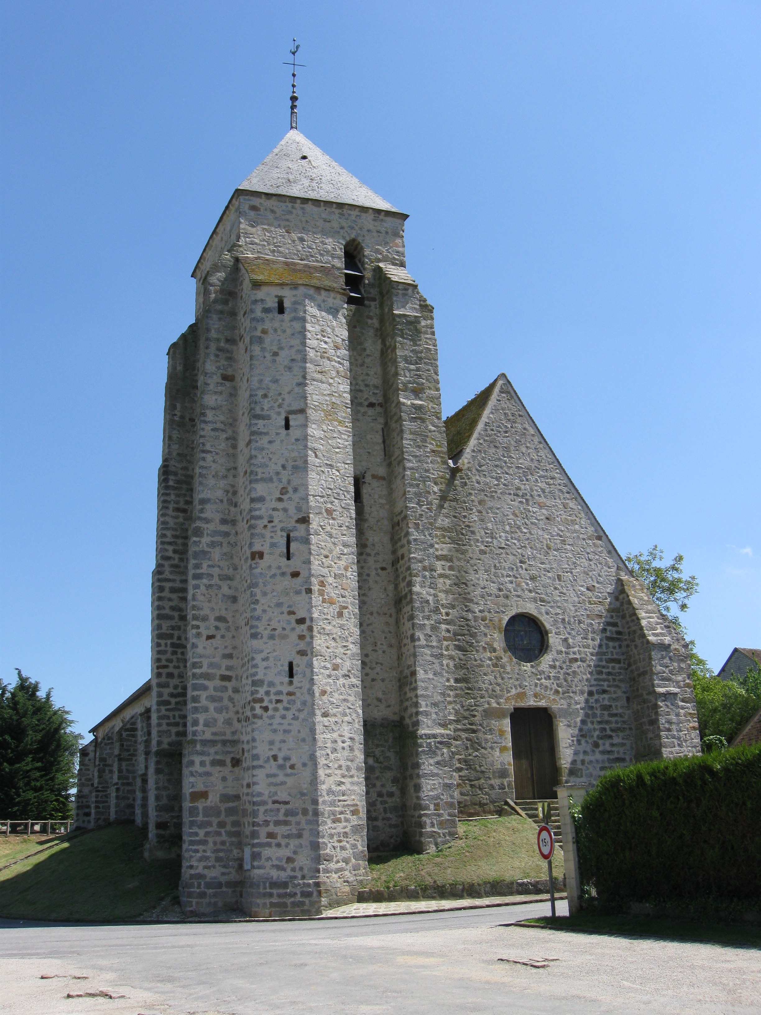 Église Saint-Jacques de Montigny-le-Guesdier. (département de la Seine-et-Marne, région Île-de-France).